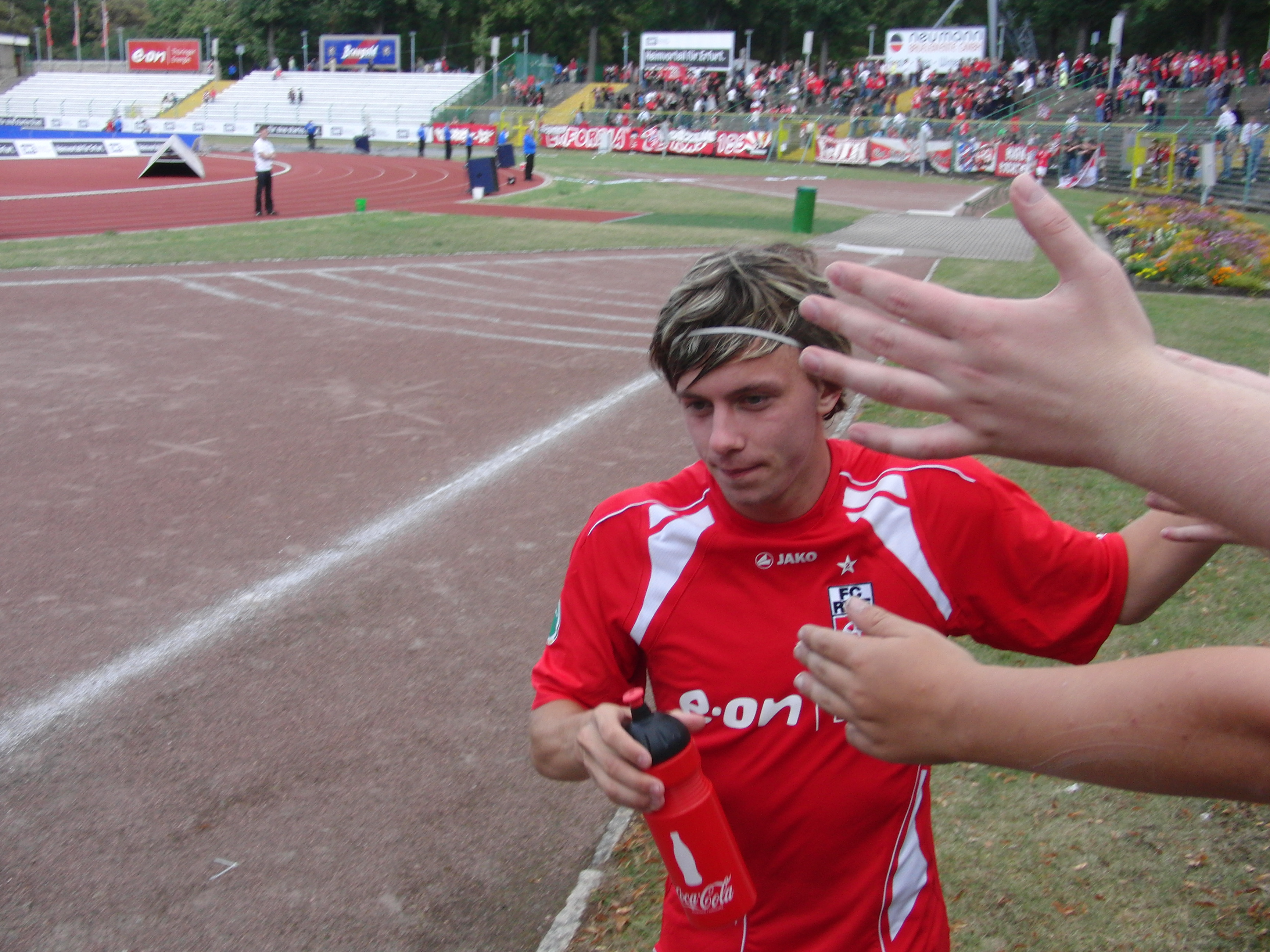 Carsten Kammlott (2009)